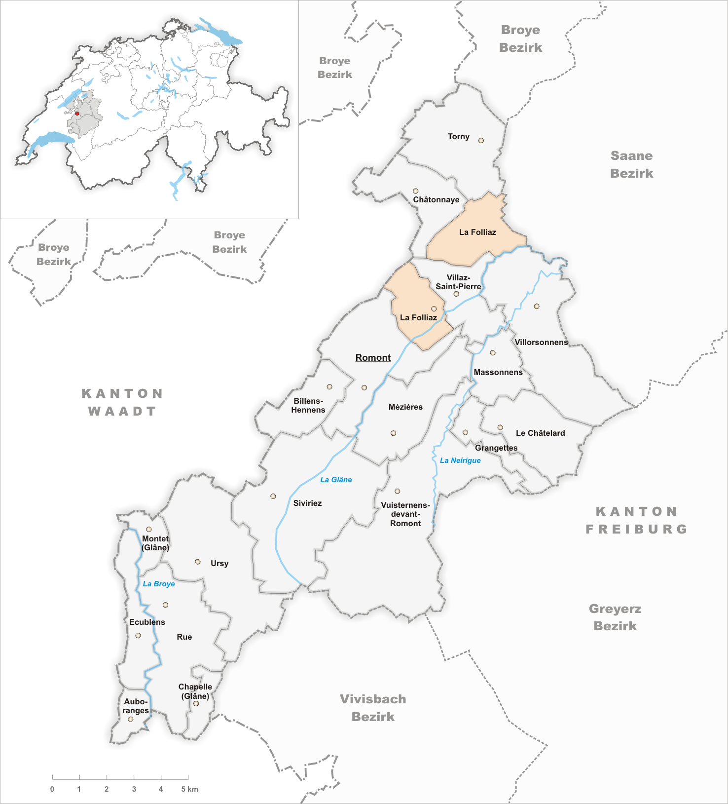 Municipality La Folliaz